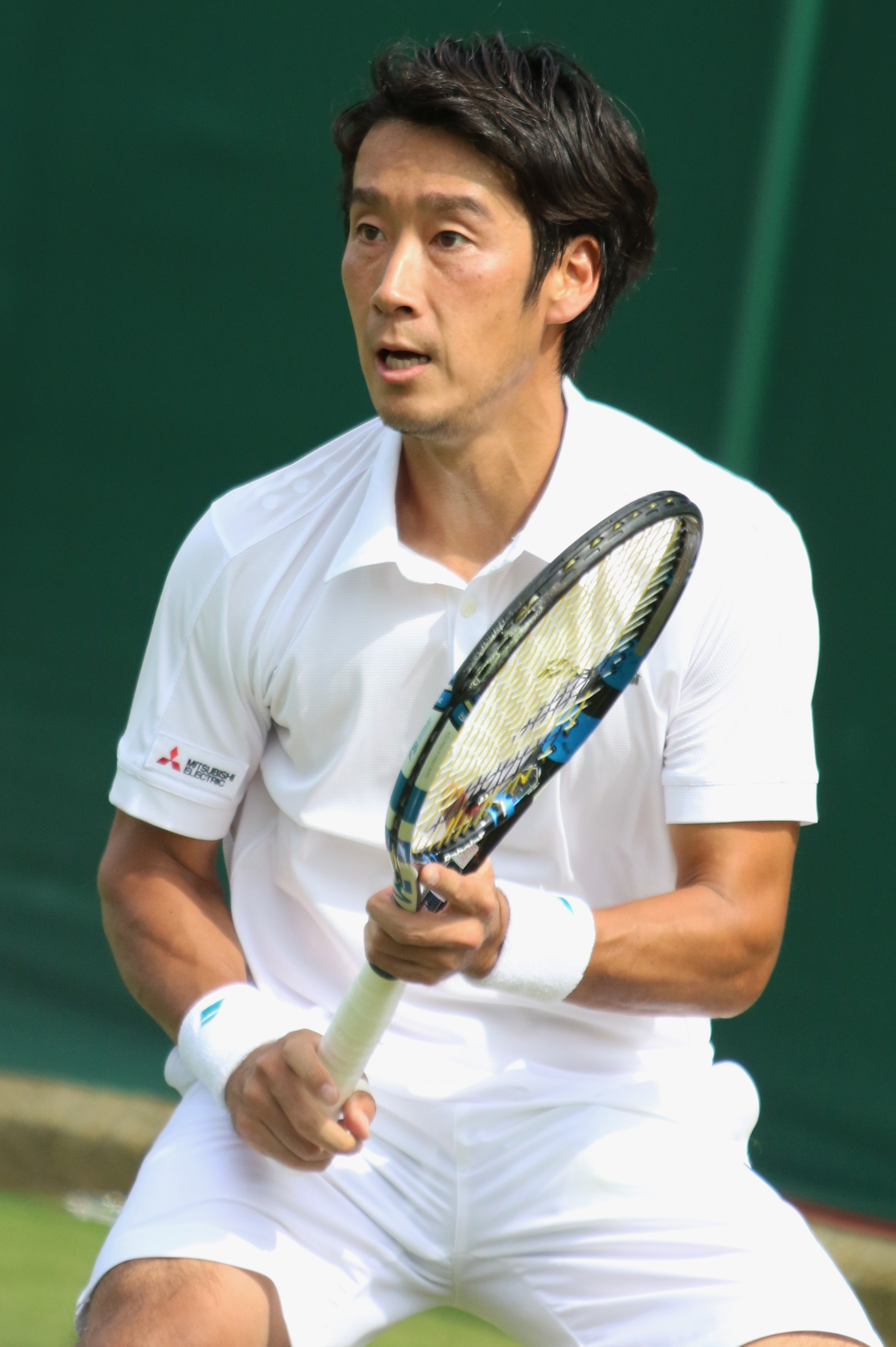 Sugita WM17 (9)